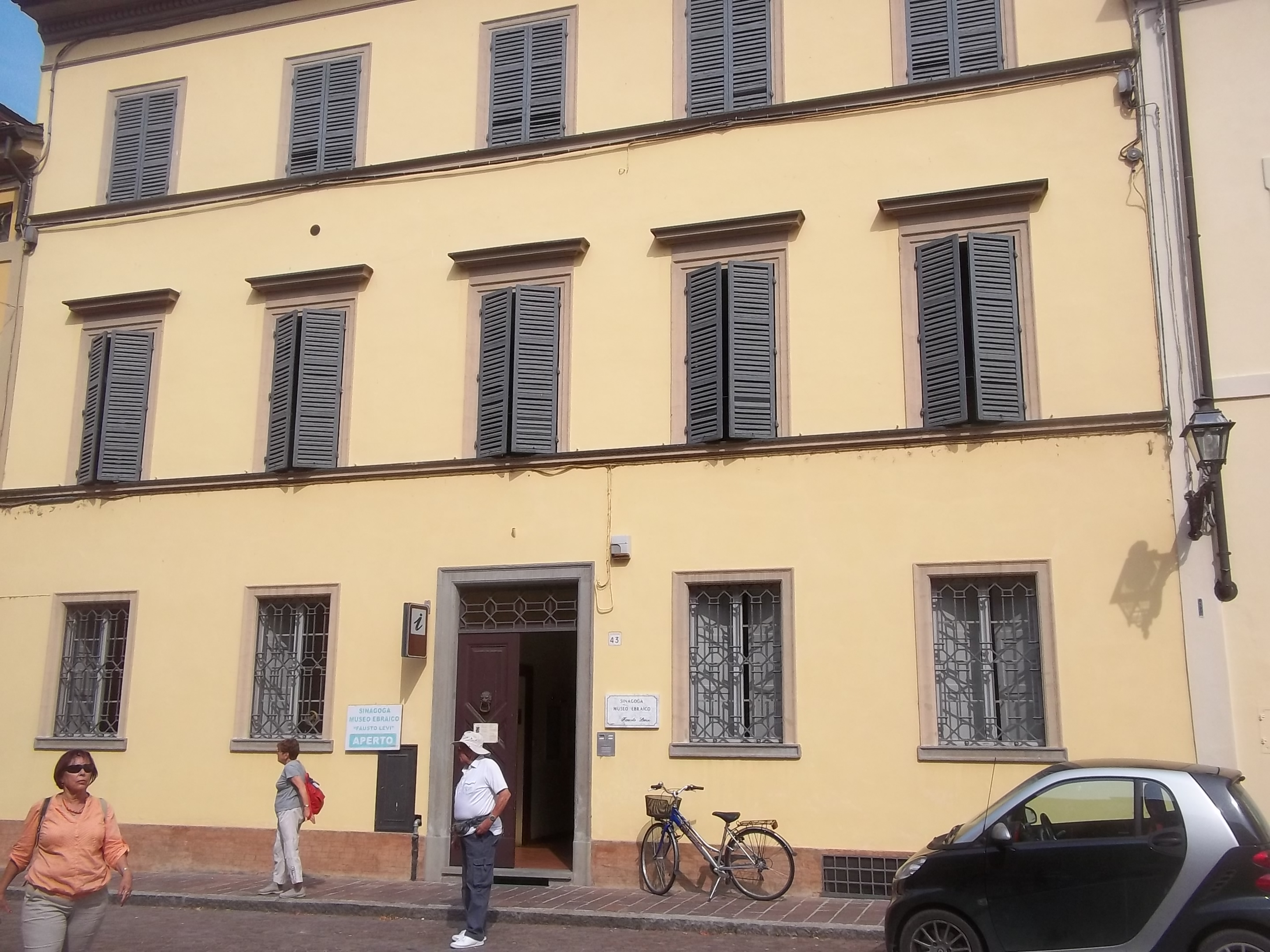 המוזיאון היהודי על שם פאוסטו לוי בעיר סוריאנה